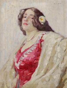 Robert Seuffert Porträt einer Dame mit Rose im Haar